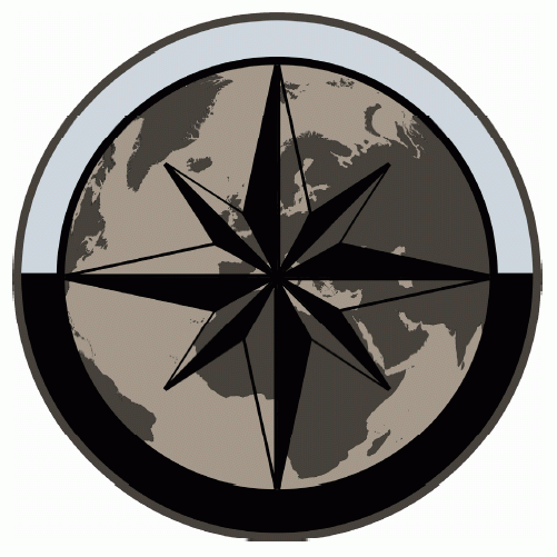 Szefostwo Służby Hydrometeorologicznej Sił Zbrojnych RP – oznaka rozpoznawcza na mundur polowy – 2012, Polska.